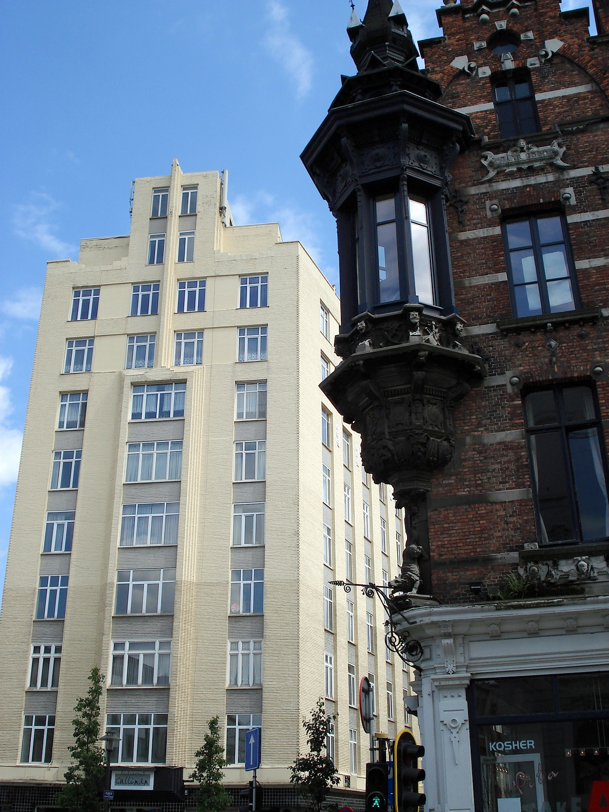 Anvers, Belgique. Quartier dit 'Klein-Antwerpen': à gauche: immeuble à étages 'Résidence Isabelle' sis angle Lange Leemstraat (Longue rue d'Argile) et Isabellalei; à droite: maison néo-renaissance (avec échauguette), arch. Seldenslach.